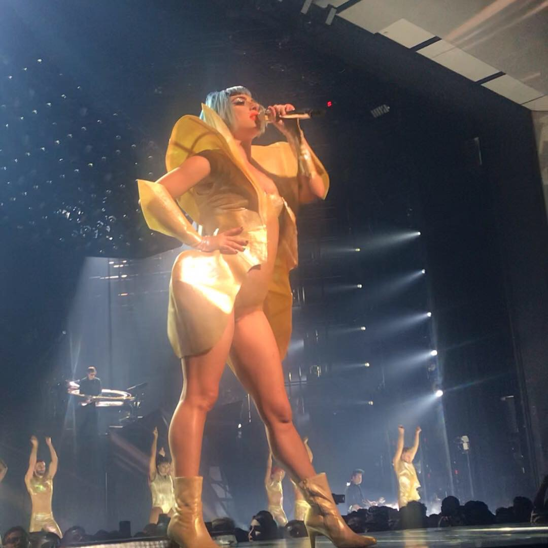 Enigma+Jazz